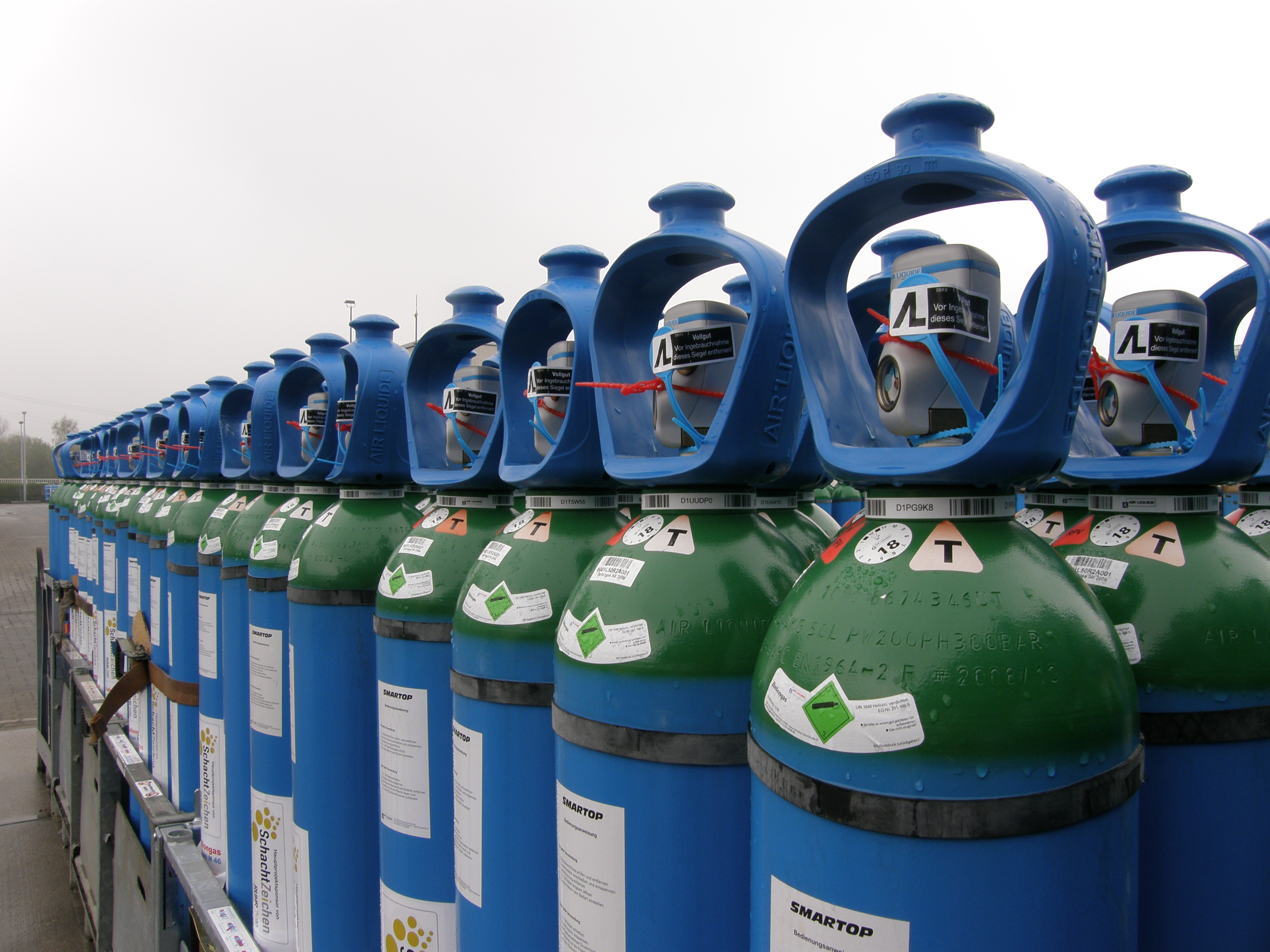 PR-Veranstaltung bei Air Liquide in Krefeld-Gellep, Präsentation der 1.500 Helium-Flasche für die Ballonfüllungen von SchachtZeichen, Flaschenreihe. Actung, die Flaschenfarbe wird normalerweise für Argon benutzt, für das Projekt SchachtZeichen wird grüner Kopf auf blauer Flasche ausnahmsweise für Helium genutzt (sonst braun auf blau). Das Ventil mit Füllstandanzeige und Sicherheitsbügel vereinfacht die Handhabung für die Volunteers.